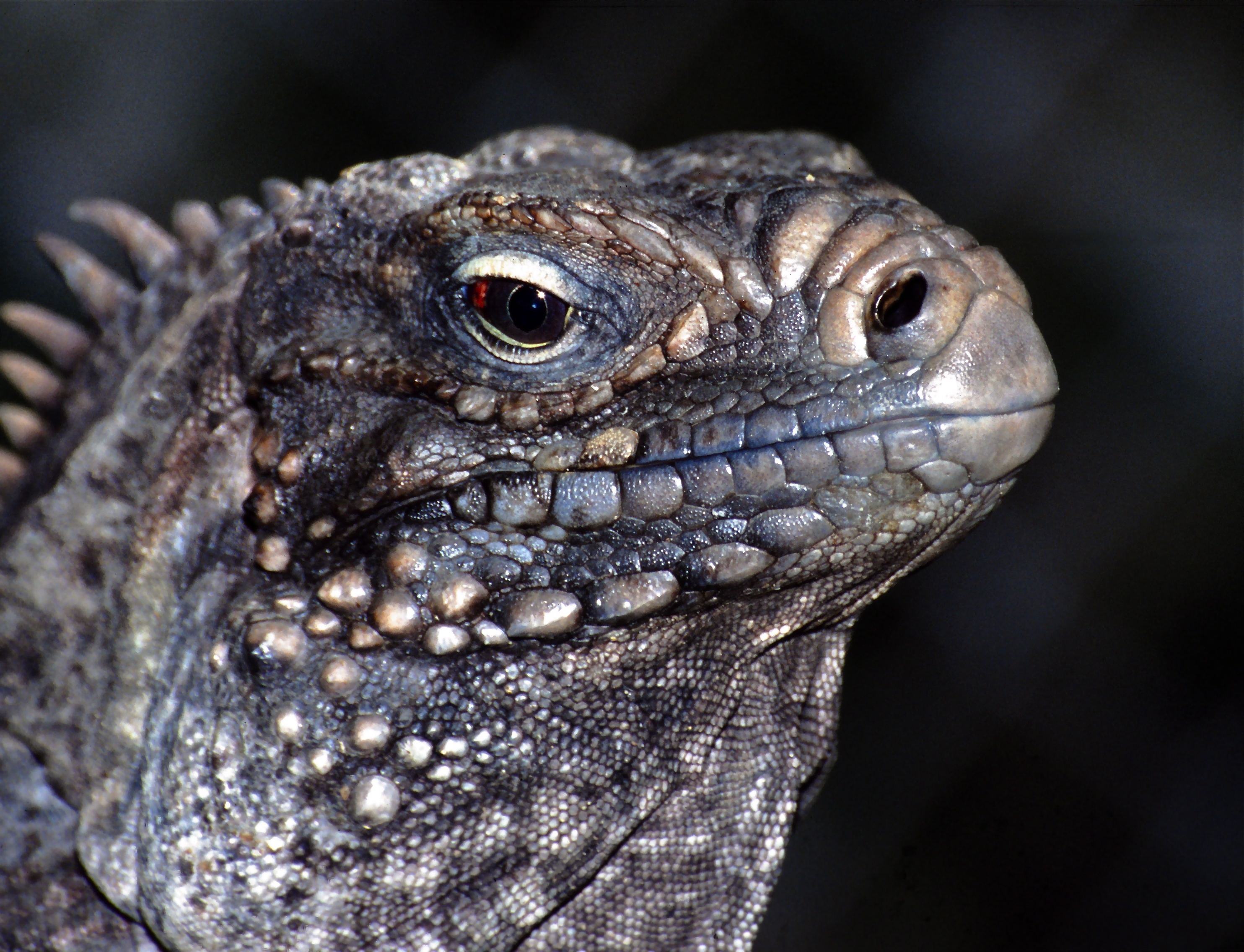 Zoo, Bangkok, THAILAND